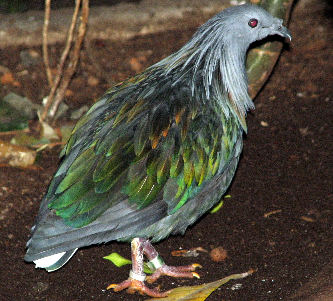 Manenduif Nicobar Pigeon Caloenas nicobarica Diergaarde Blijdorp Rotterdam december 2007